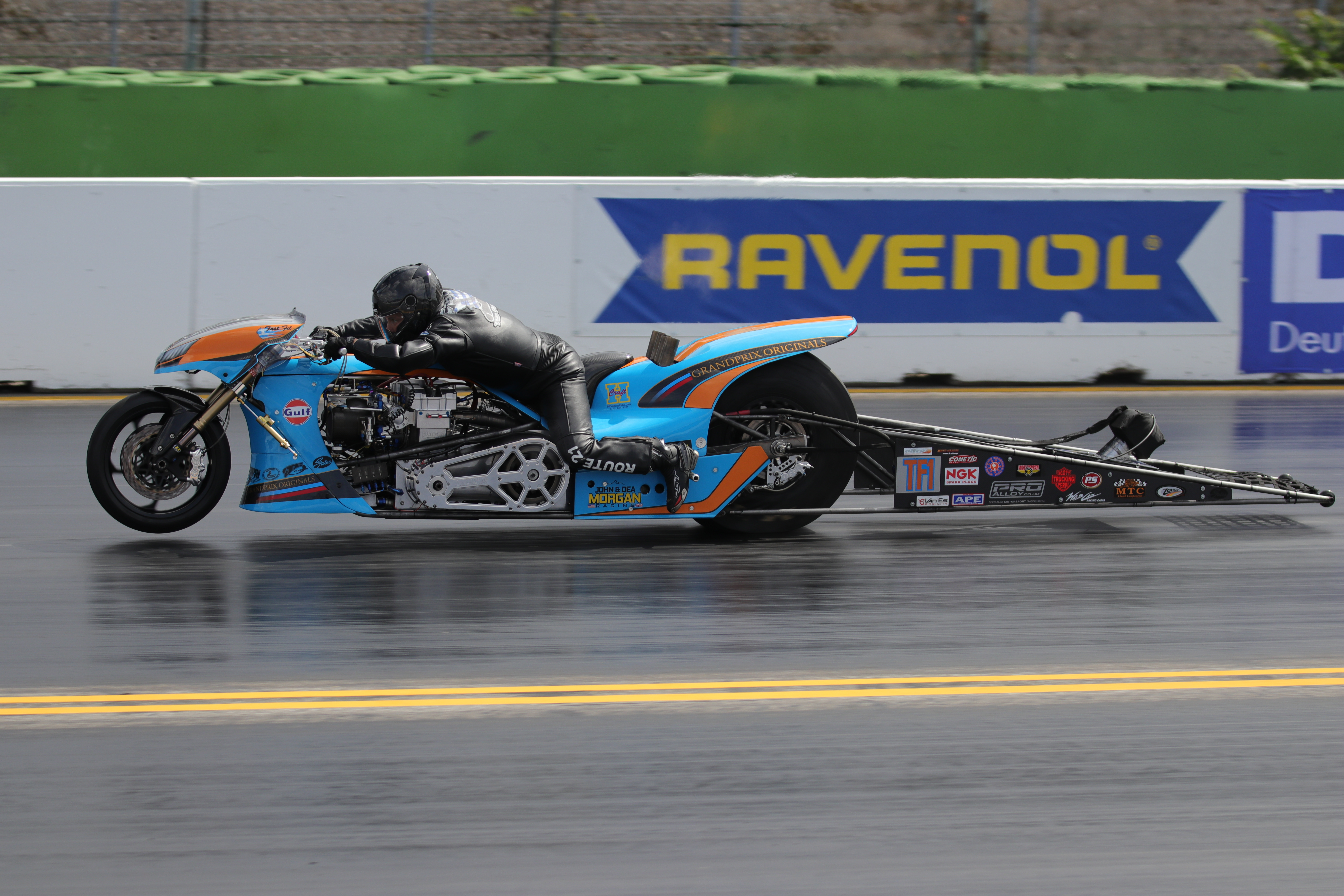 Startendes Top Fuel Bike, NitrOympX 2019, F. Papafilipou (GRE)